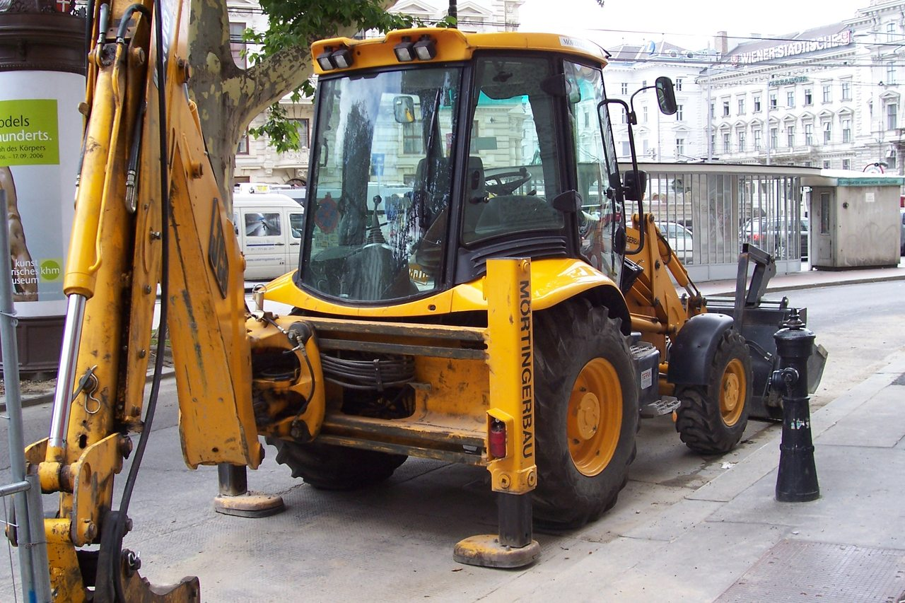 JCB-Baggerlader 3CX